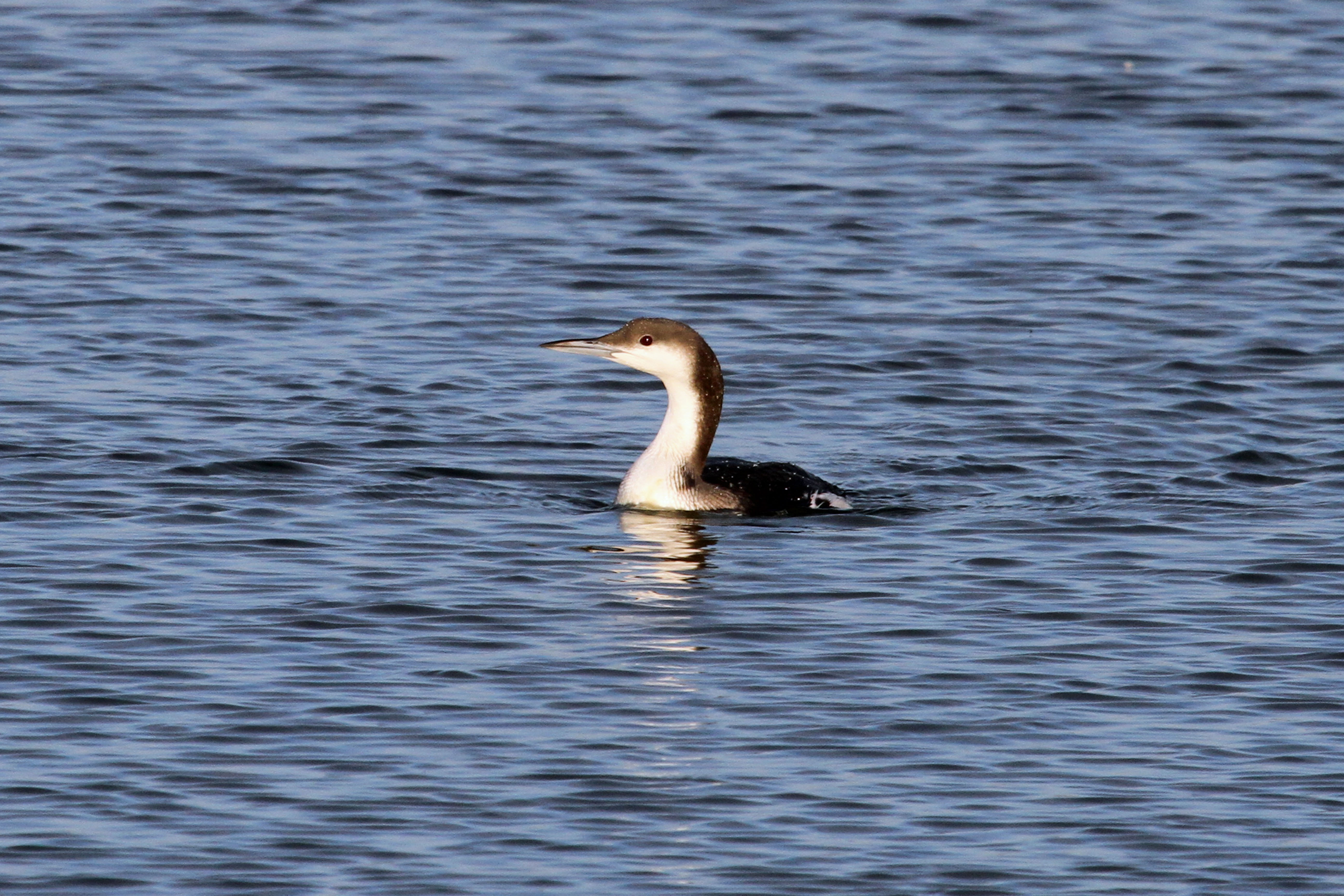 Pacific Loon